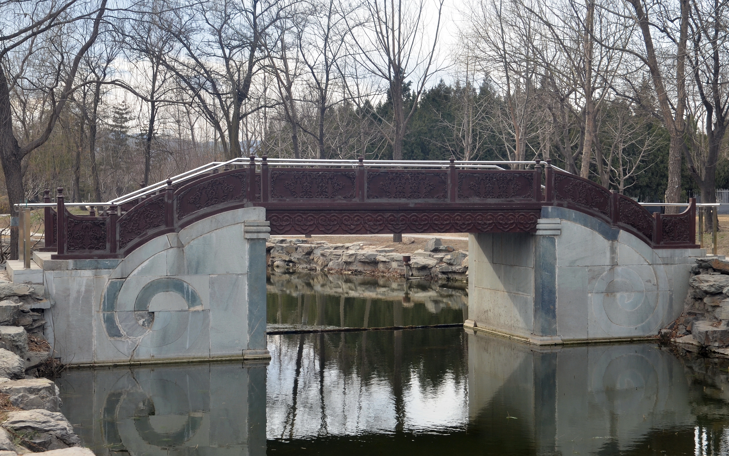 中文（中国大陆）: 圆明园九洲清晏东南的如意桥 (由东向西拍摄), 在残存遗址以及遗存构件的基础上复建. 桥身侧面浮雕“如意卷纹”, 桥上木栏杆透雕“番草抱叶”, 桥板为多块两端带圆环的“提环板”.